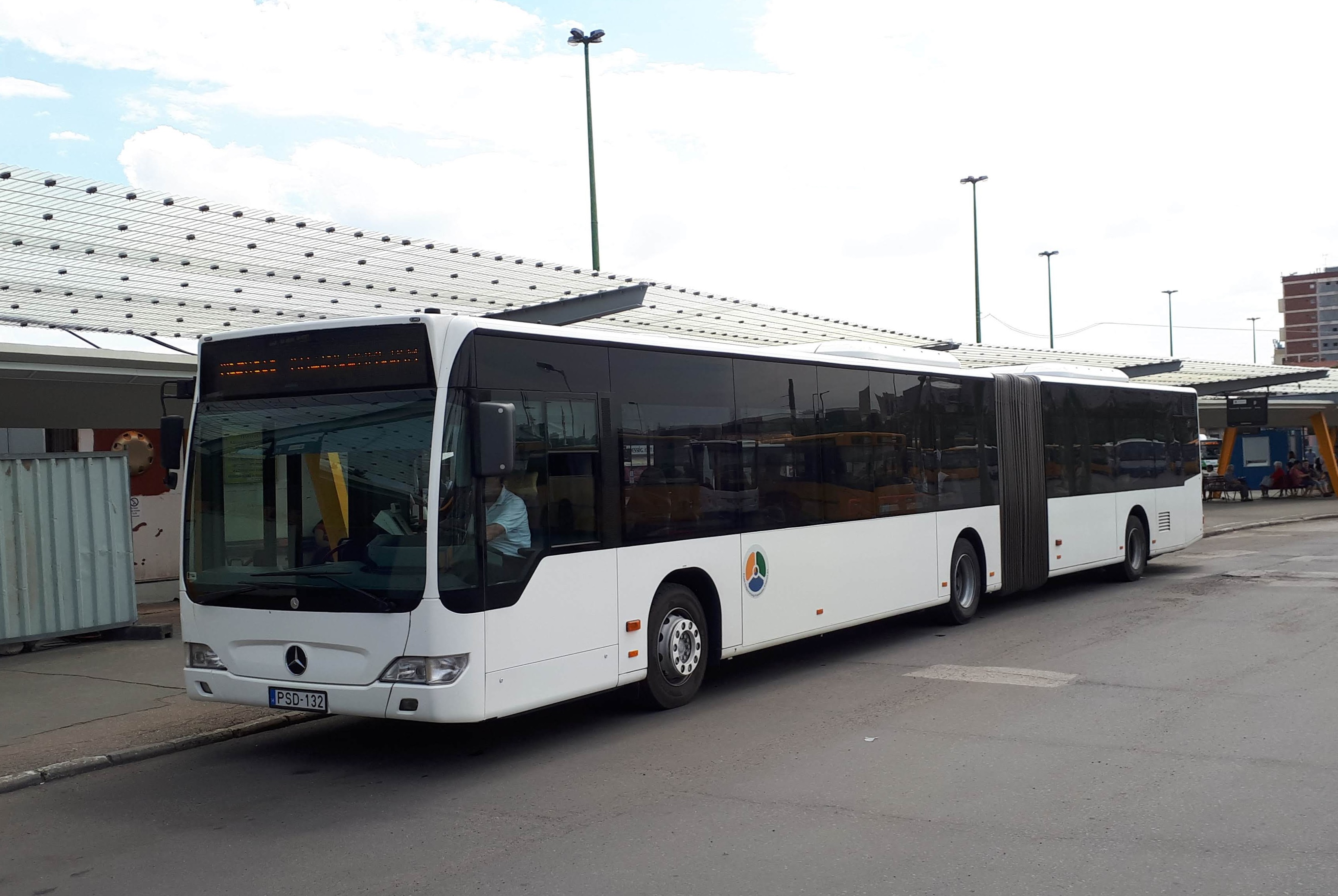 Az ÉMKK PSD-132 rendszámú Mercedes Citaro busza Miskolcon, a 3765-ös helyközi járaton.